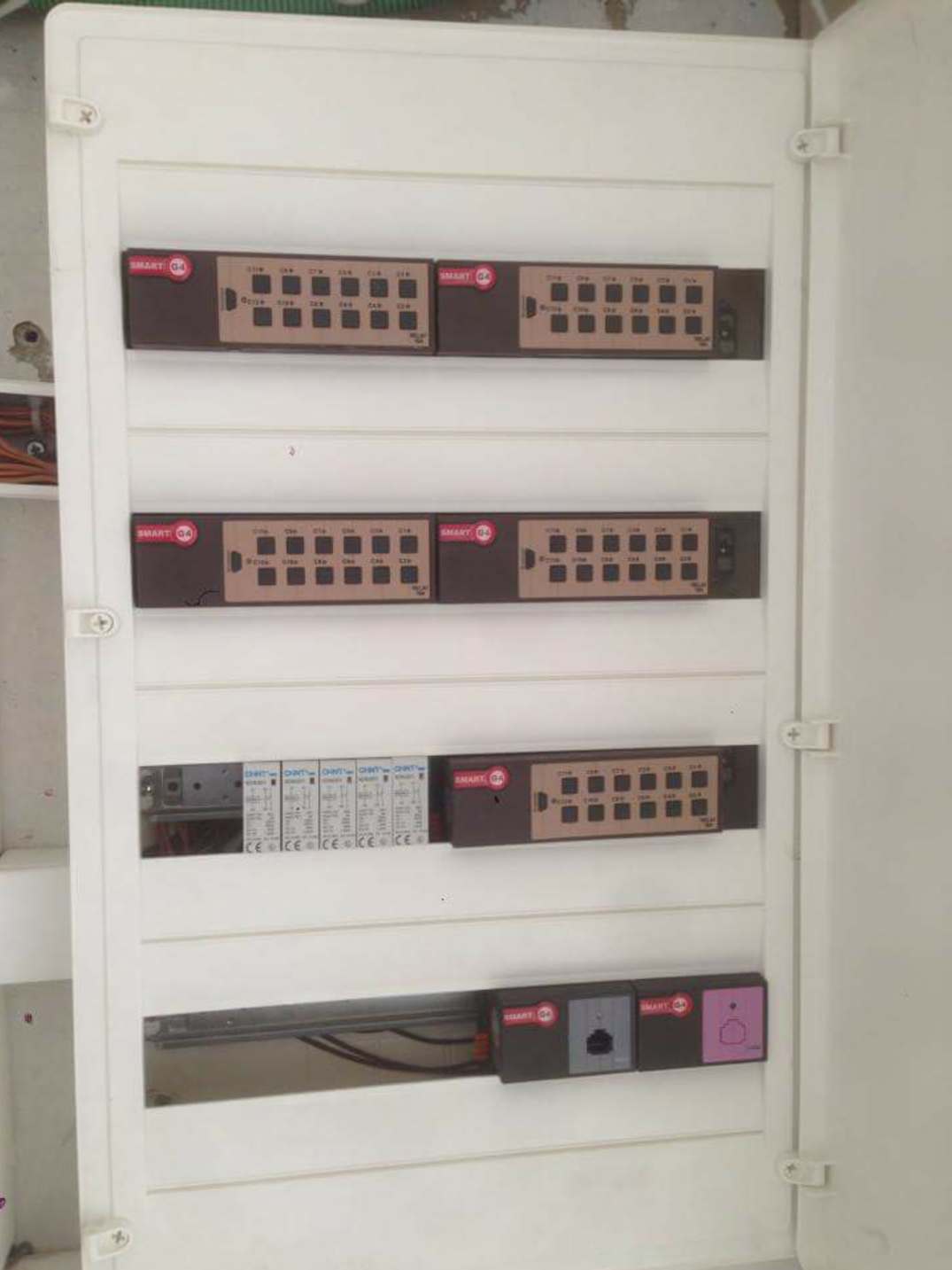 ארון חשמל בו מותקנים בקרים חכמים